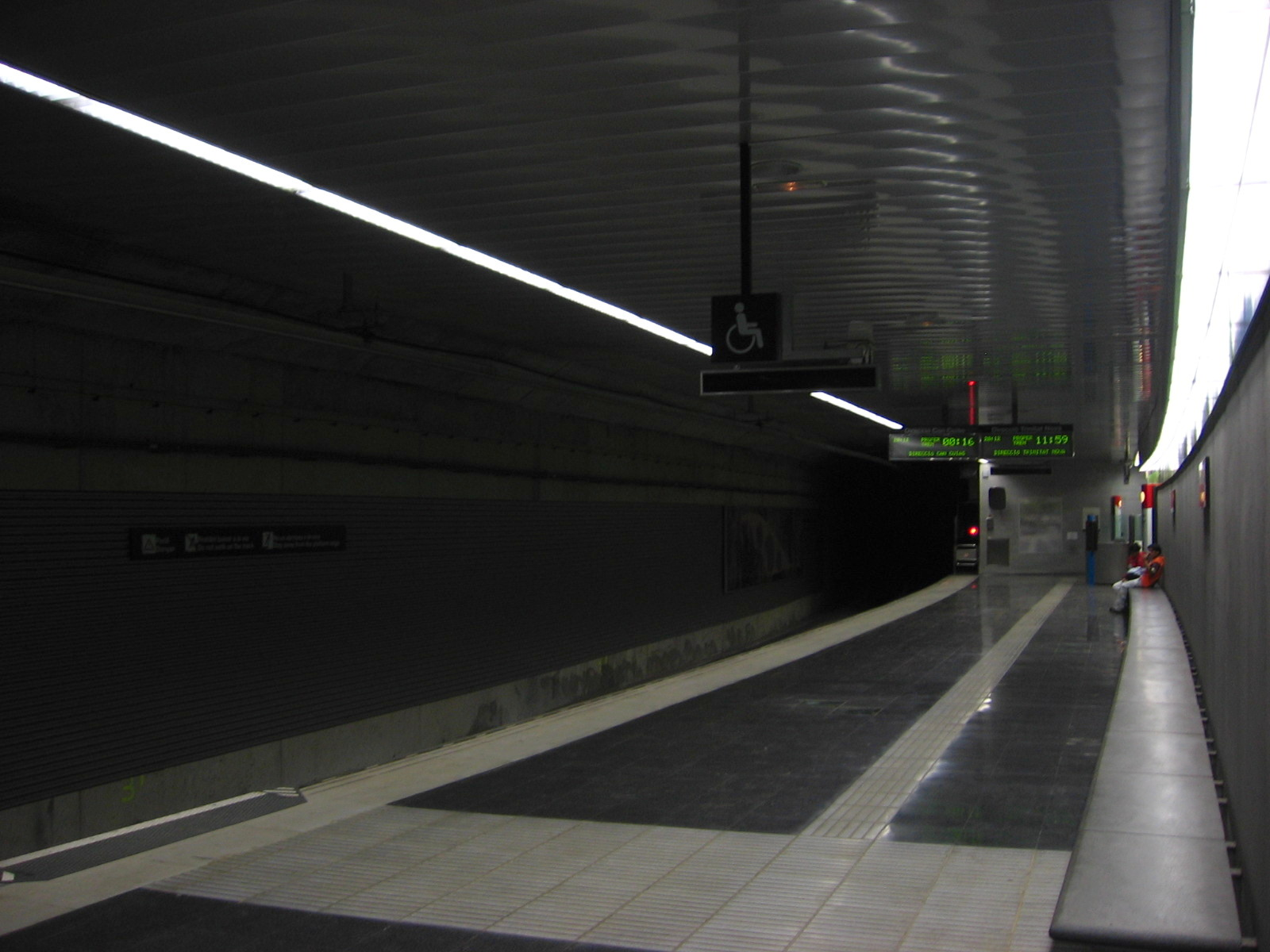 Casa de l'Aigua station, Barcelona Metro/Estació Casa de l'Aigua del metro de Barcelona